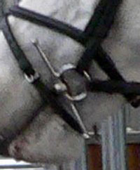 Full-cheek